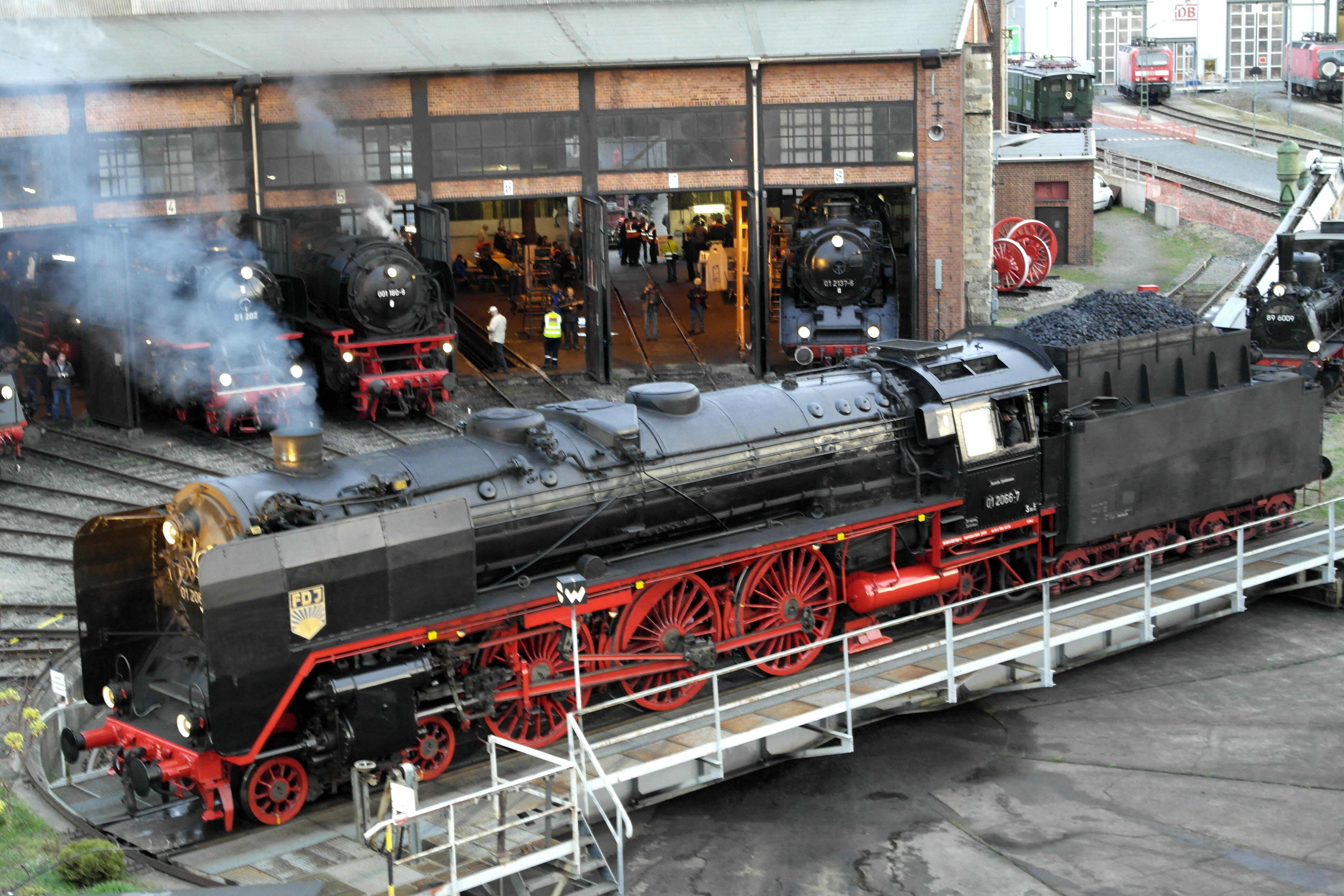 Dampflokfest in Dresden von der Nossener Brücke aus Lokschuppen des Eisenbahnmuseums Dresden-Altstadt